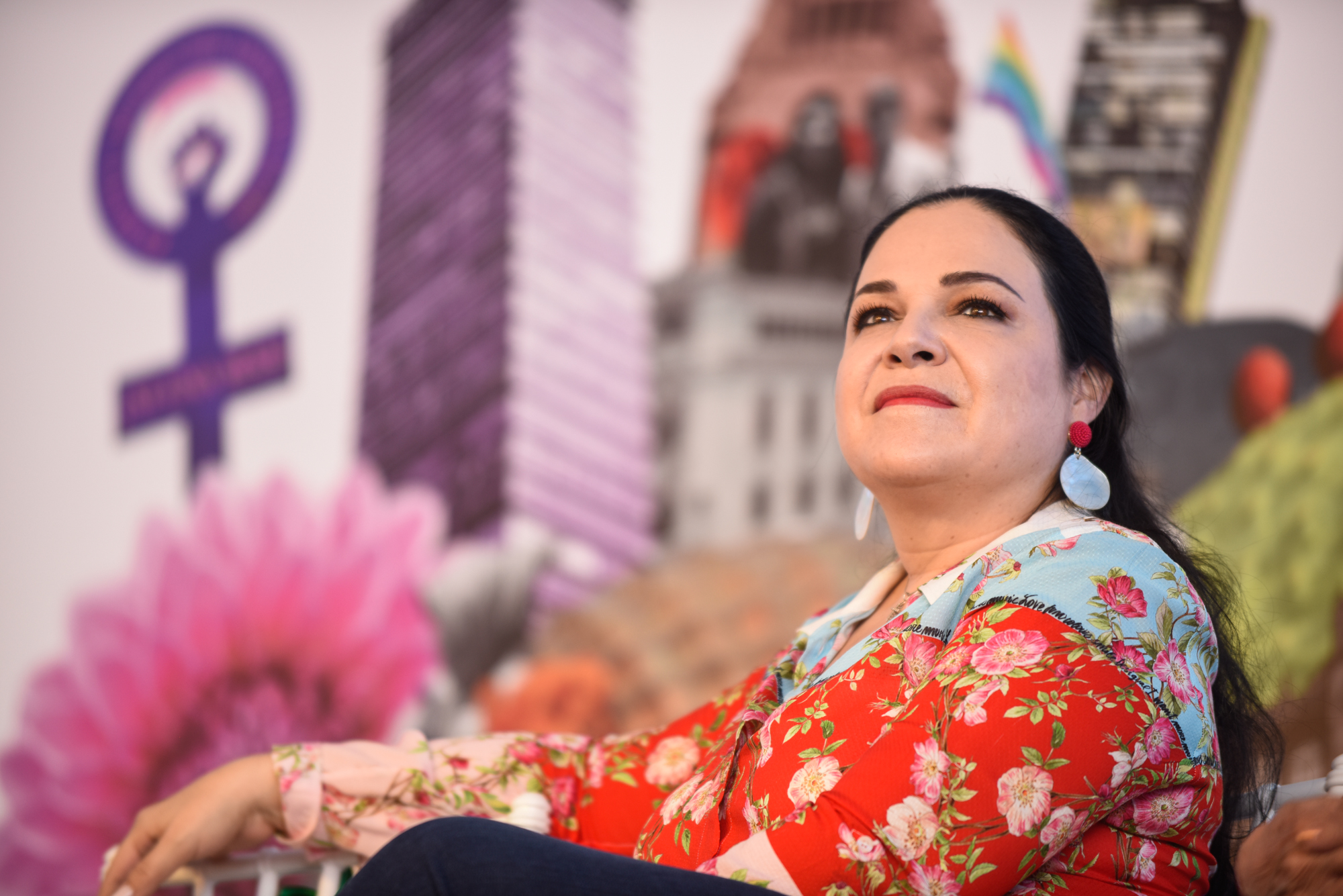 Ha ocupado, entre varios cargos, los de diputada federal y senadora, este último para el periodo de 2018 a 2024.